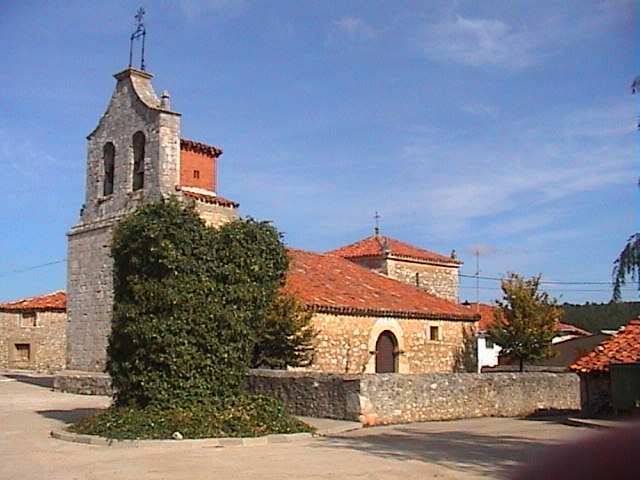 Iglesia Nuestra Señora de le Natividad de Herrera de Soria